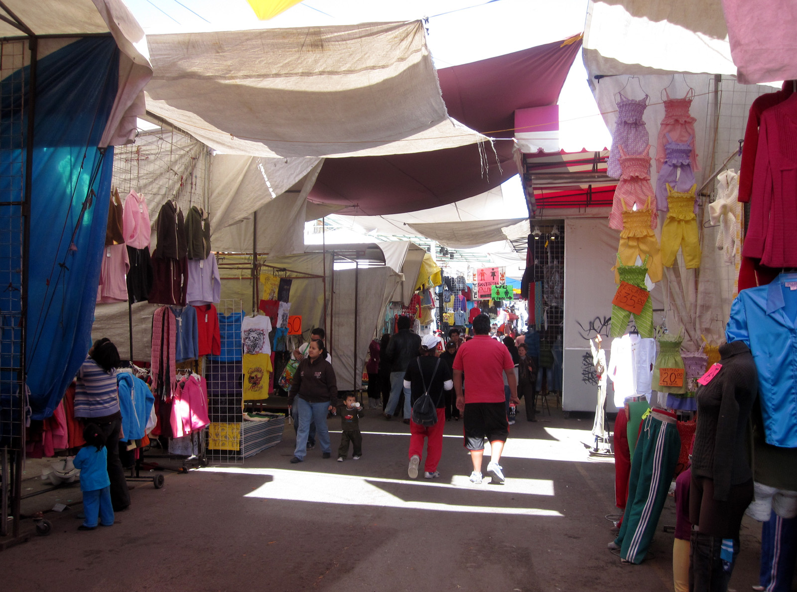 Klesmarkedet i Chiconcuac i Mexico